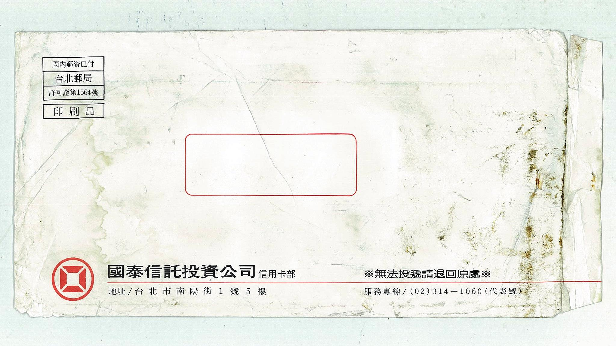 中文（台灣）: 1992年11月國泰信託投資公司信用卡部信封正面。